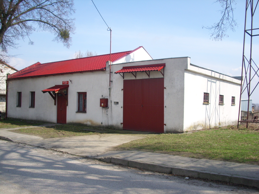 osp jastrzębie